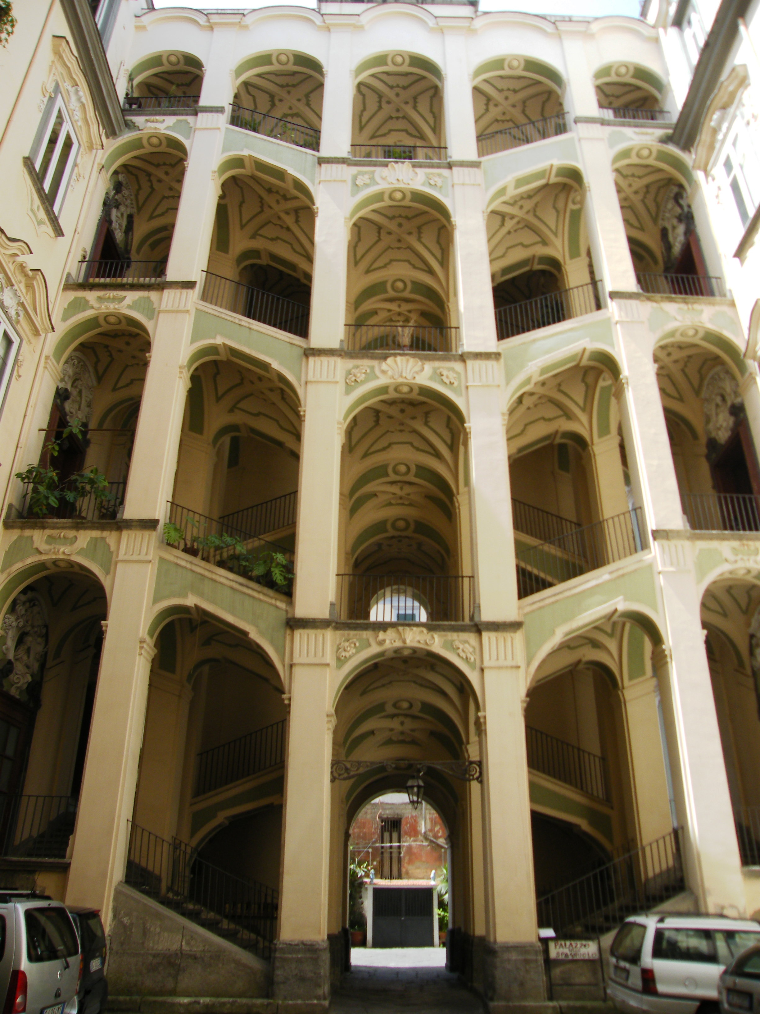 Napoli - Vico Vergini Palazzo dello Spagnuolo